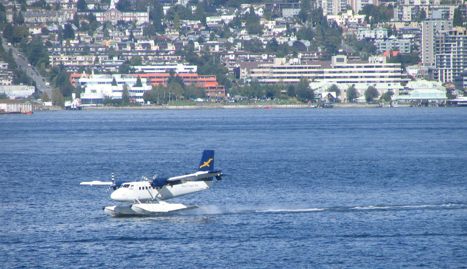 This image was created by me, Flying Penguin of Pacific Spirit Photography of Burnaby, British Columbia, Canada.